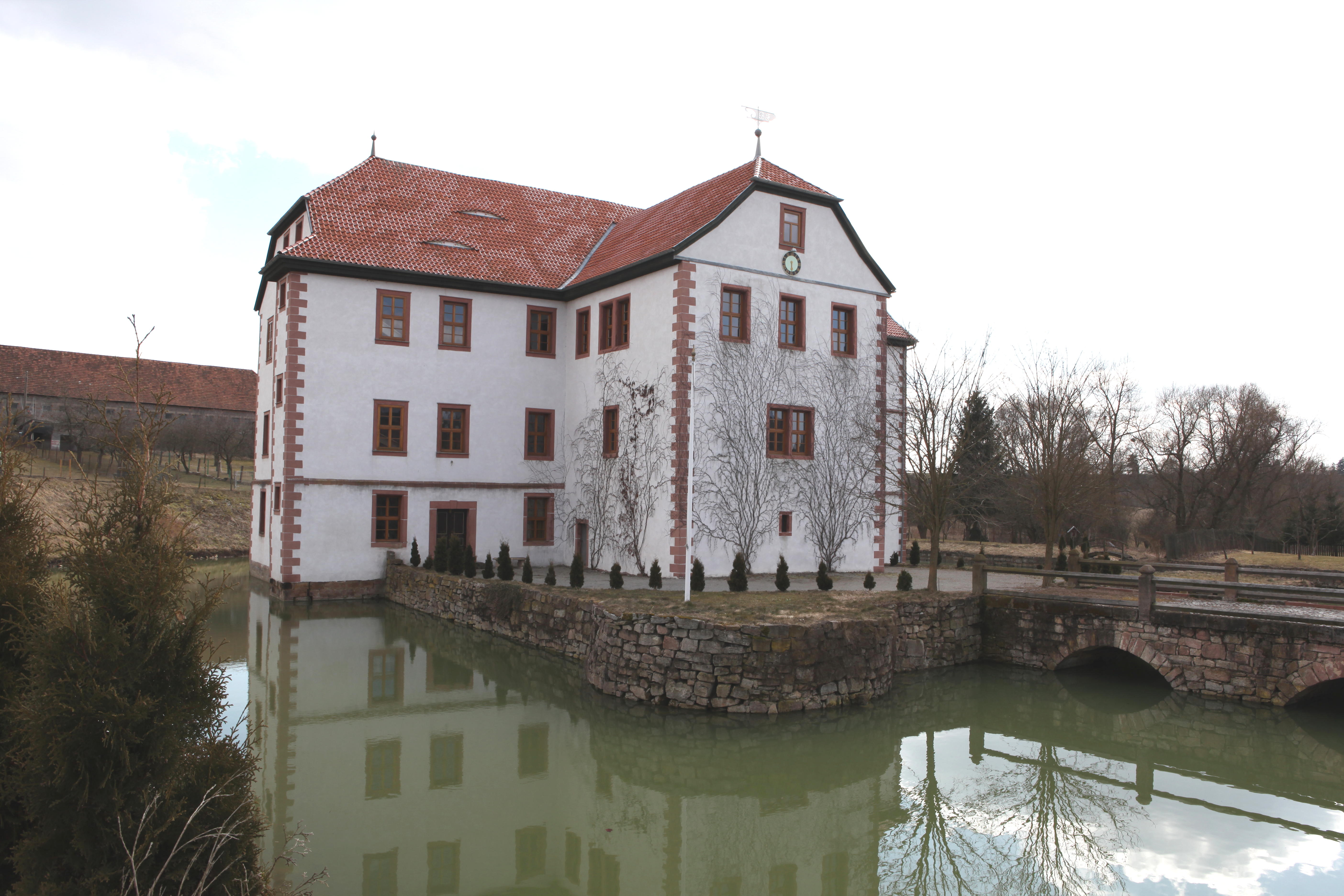 Schloss in Oberstadt, Landkreis Hildburghausen